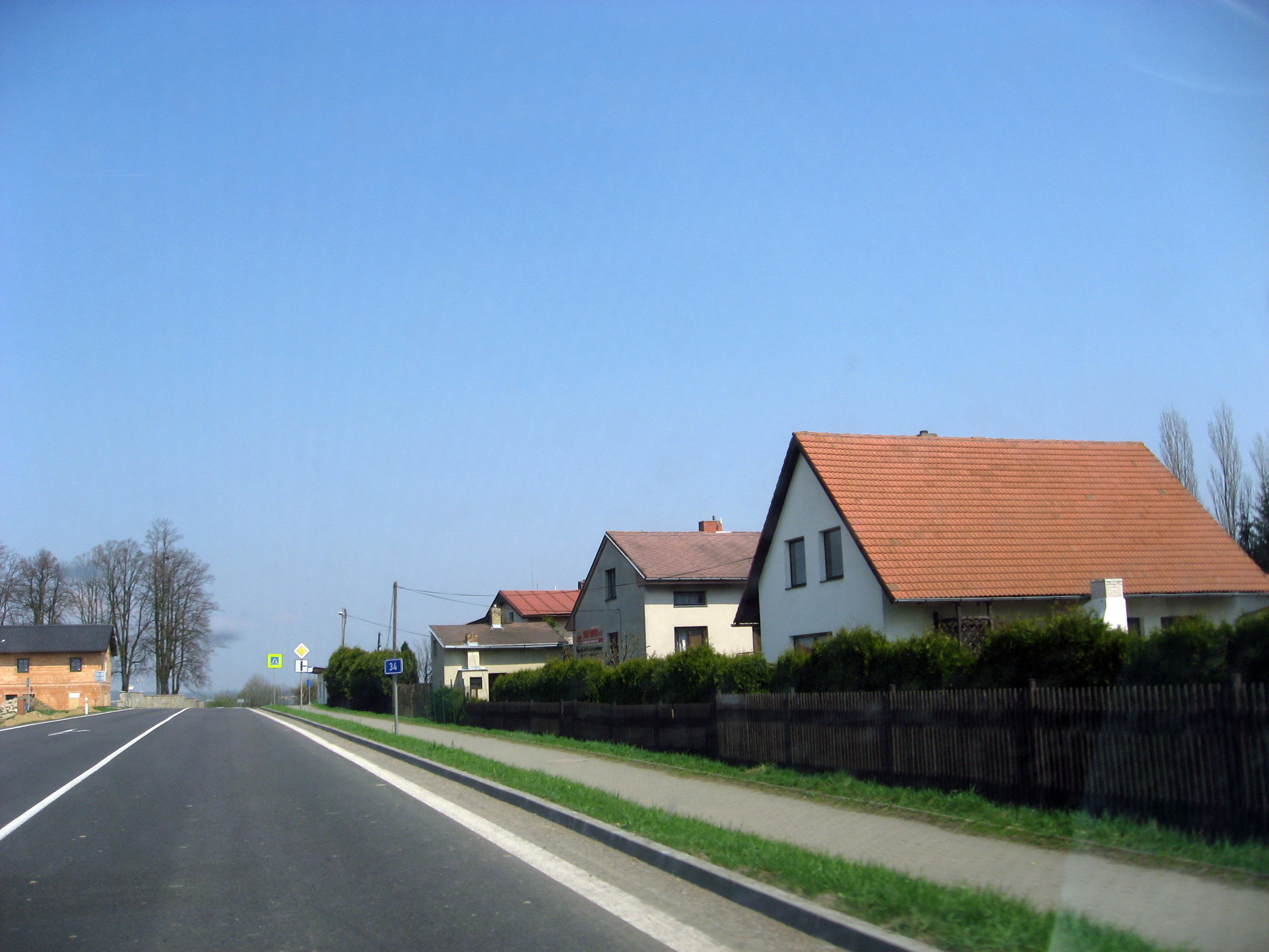 Šmolovy